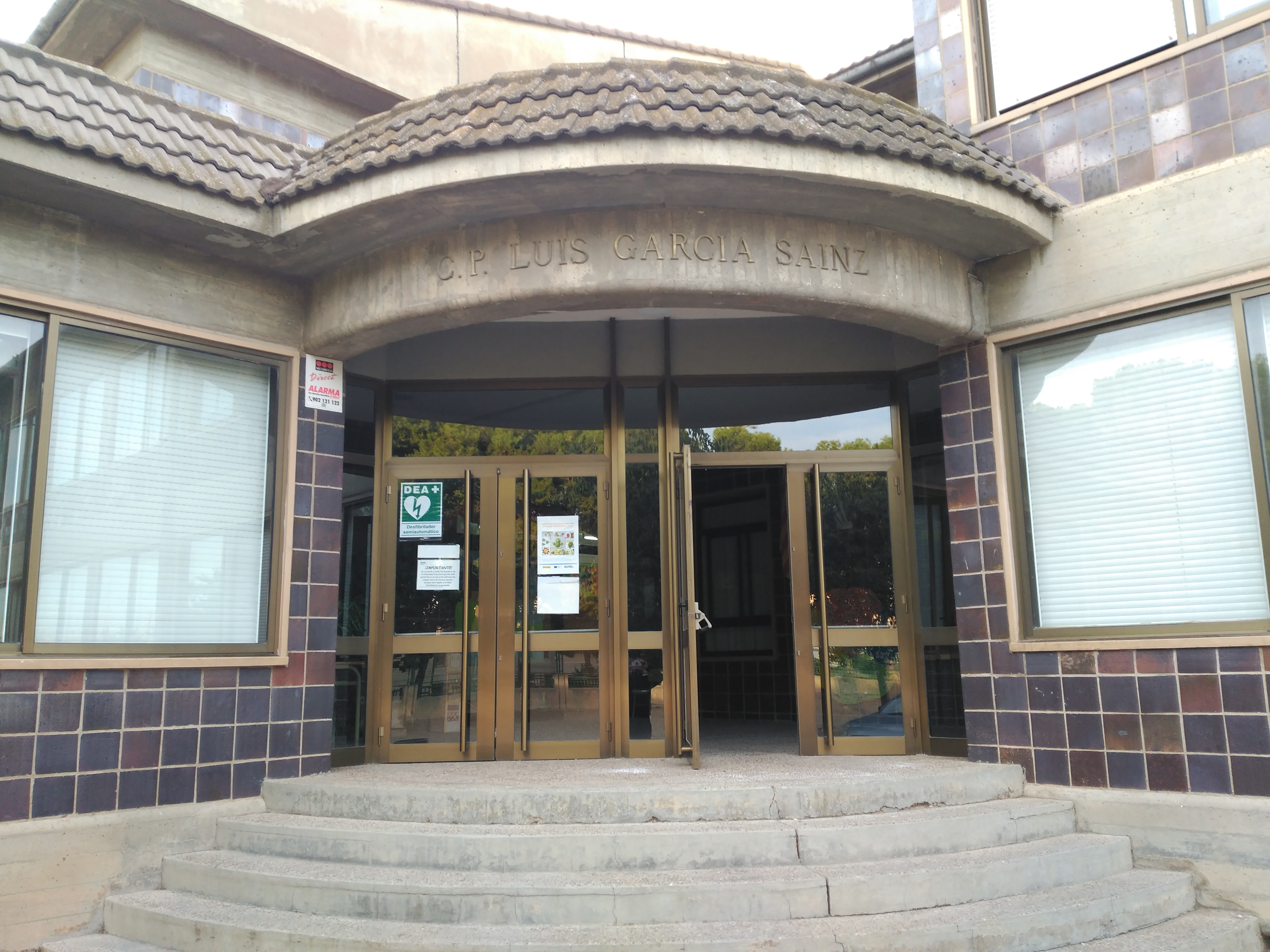 Colegio en Quinto de Ebro en honor de Luis García Sainz. Luis tuvo una relación con el pueblo por parte paterna. Muríó en este localidad en accidente de tráfico